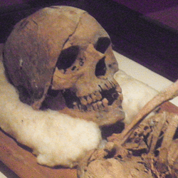 Description: Medieval skeleton in open casket.